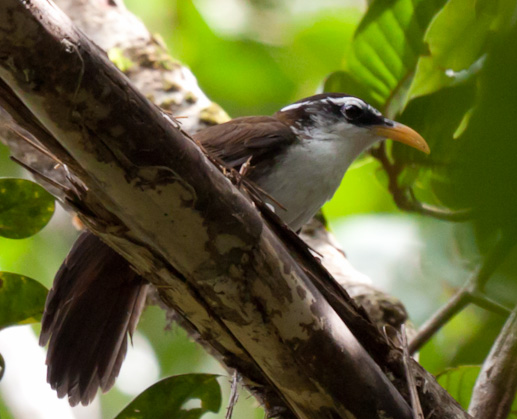 Pomatorhinus melanurus